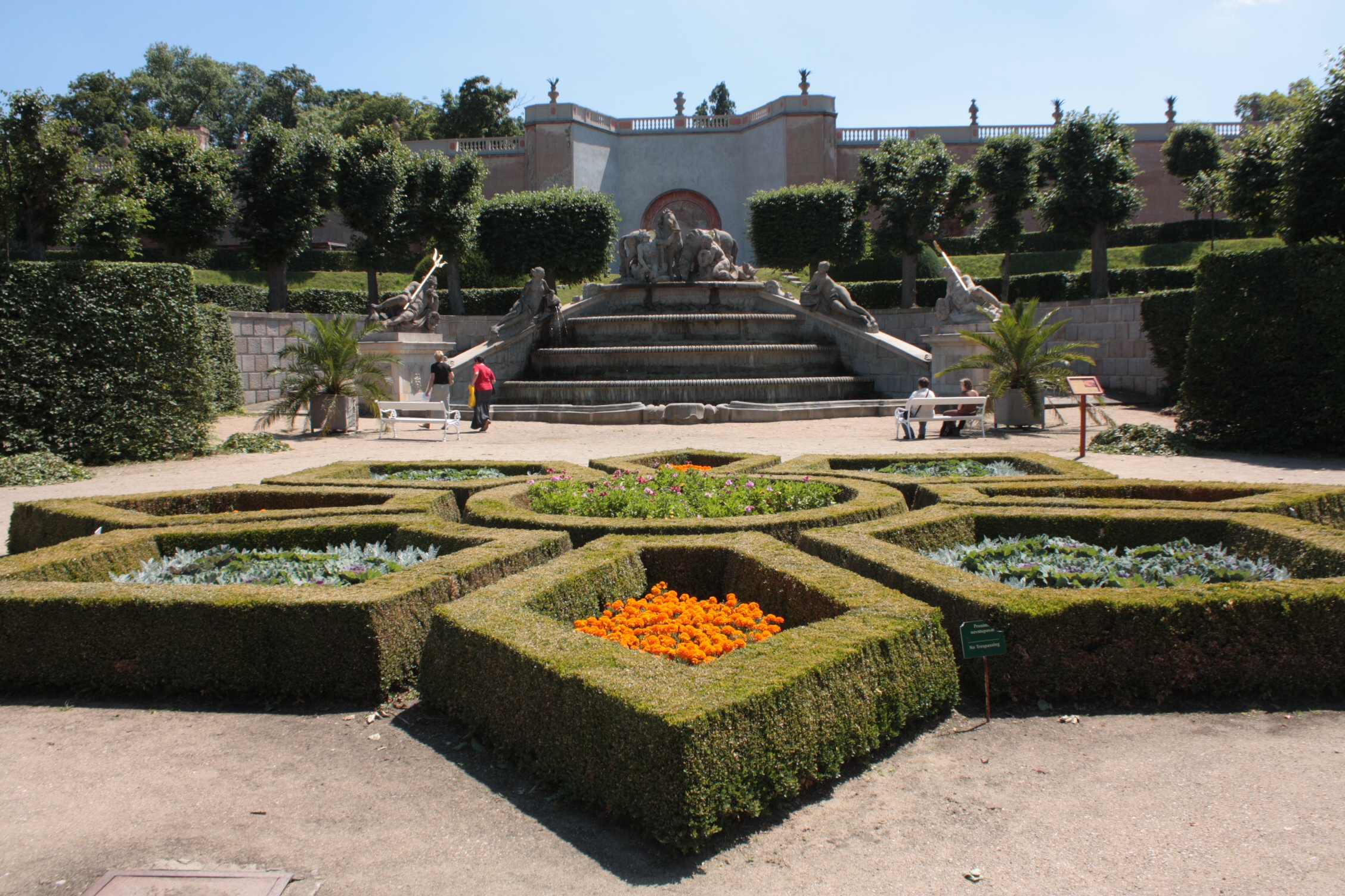 Zámek Dobříš, zahrada, okrasný záhon, letničky